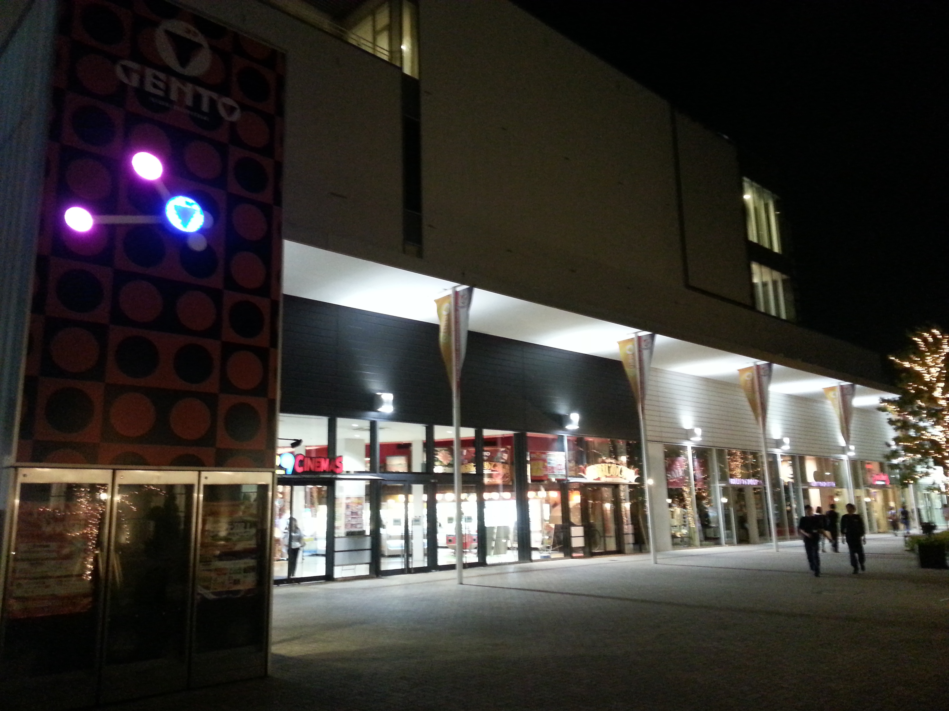 ゲントヨコハマの歩行者導線側出入り口。